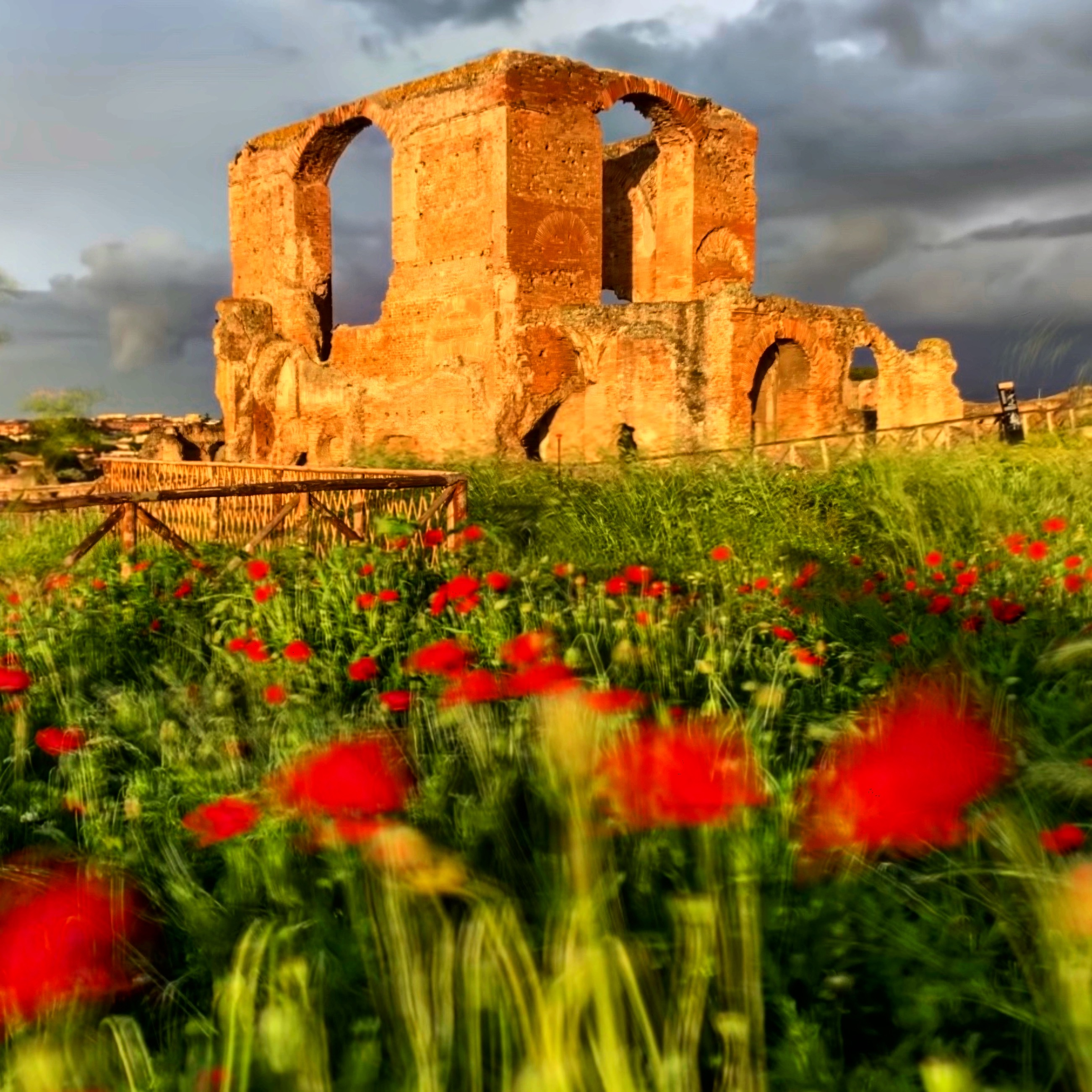 Papaveri a Villa dei Quintili This is a photo of a monument which is part of cultural heritage of Italy.